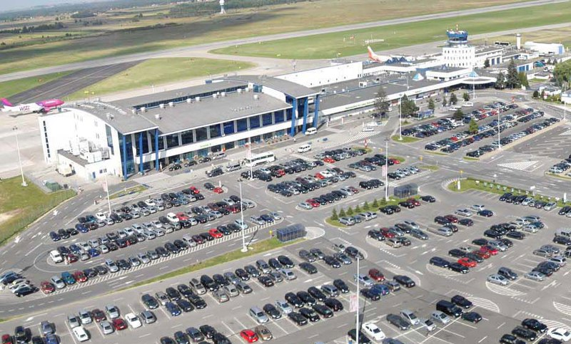 Luftbild Flughafen Kattowitz